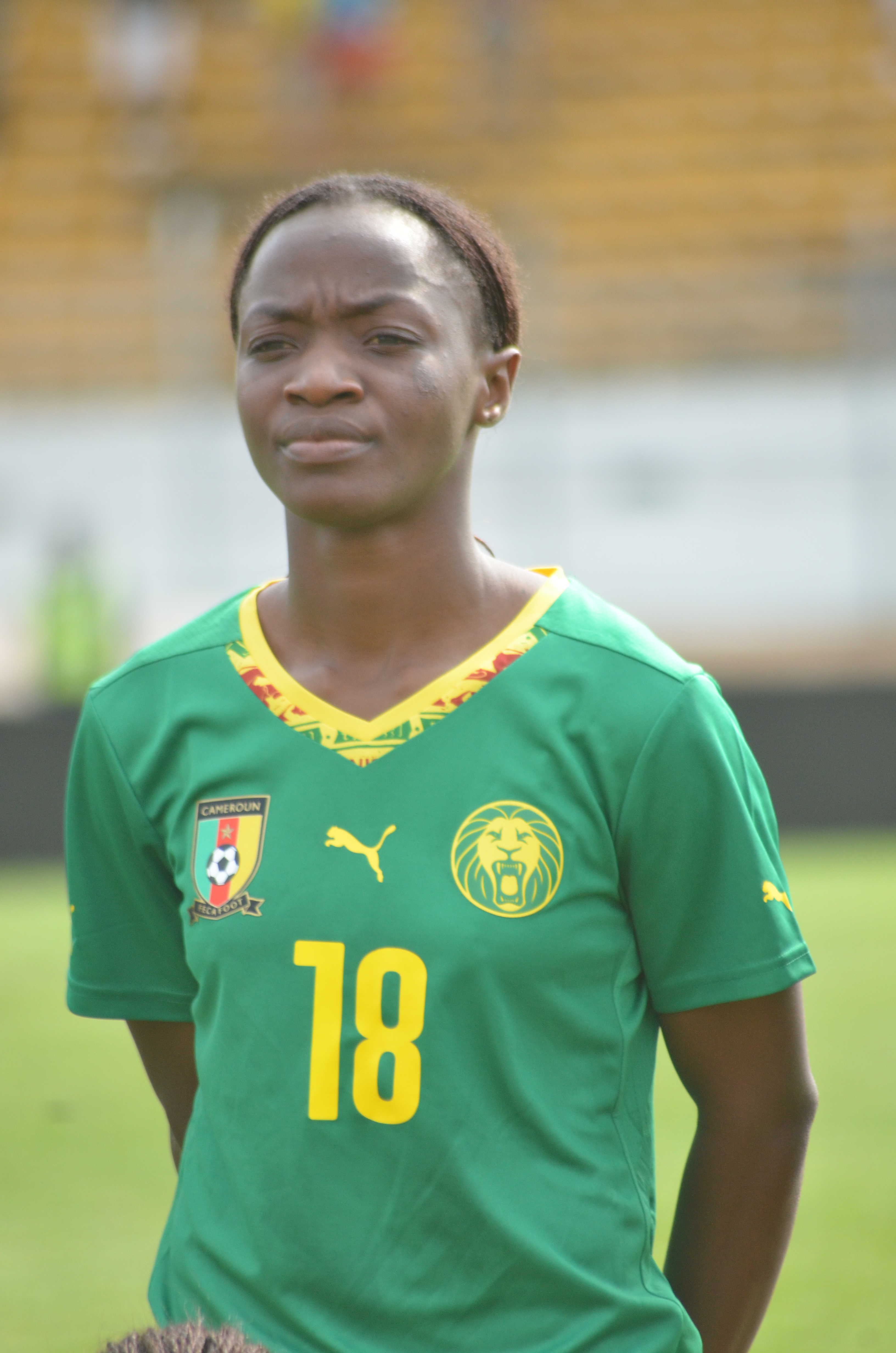 Attaquante de l'équipe nationale de football du Cameroun